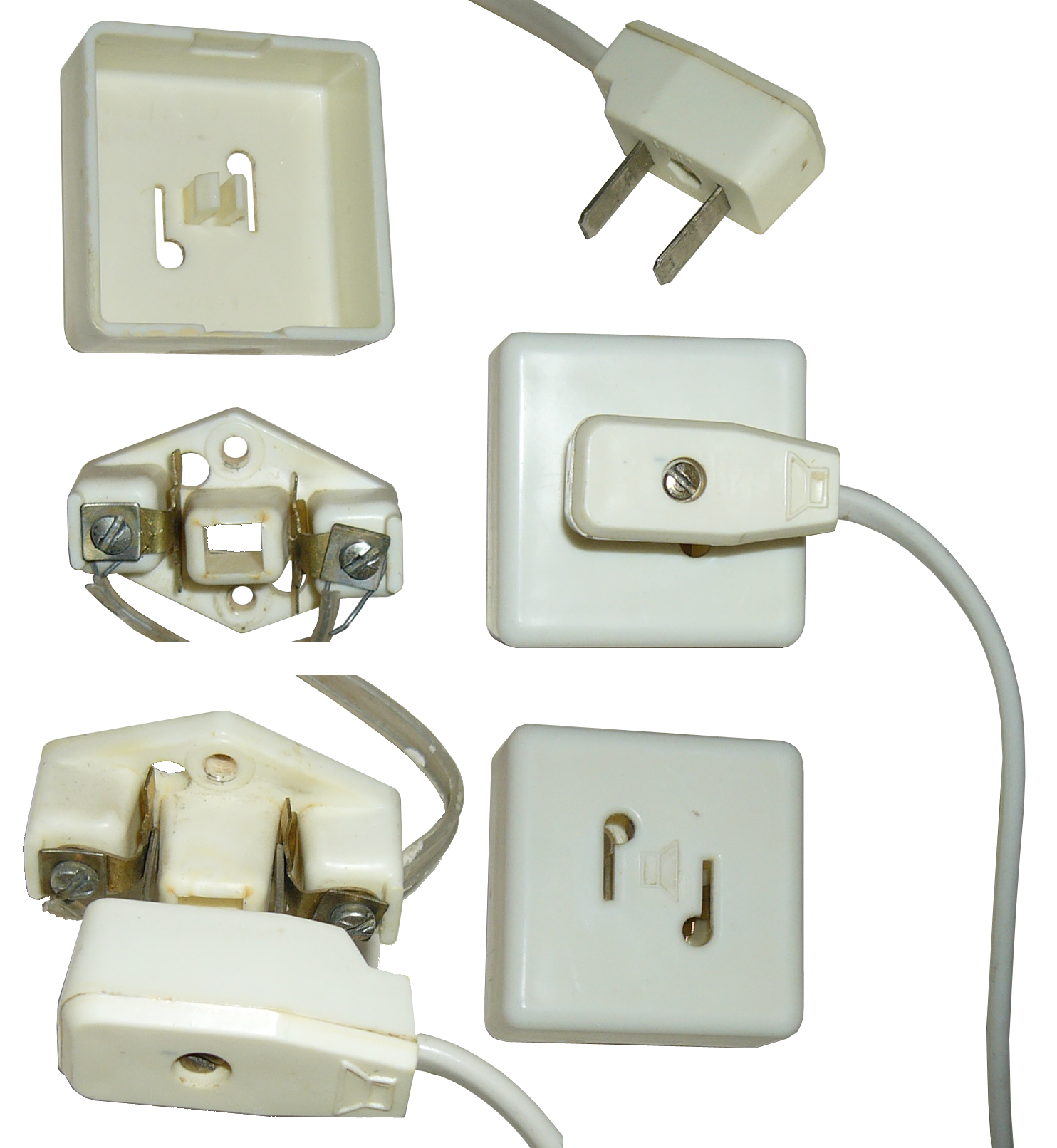 Вилка ВПВ-1 с розеткой РПВ-1 для абонентской радиоточки